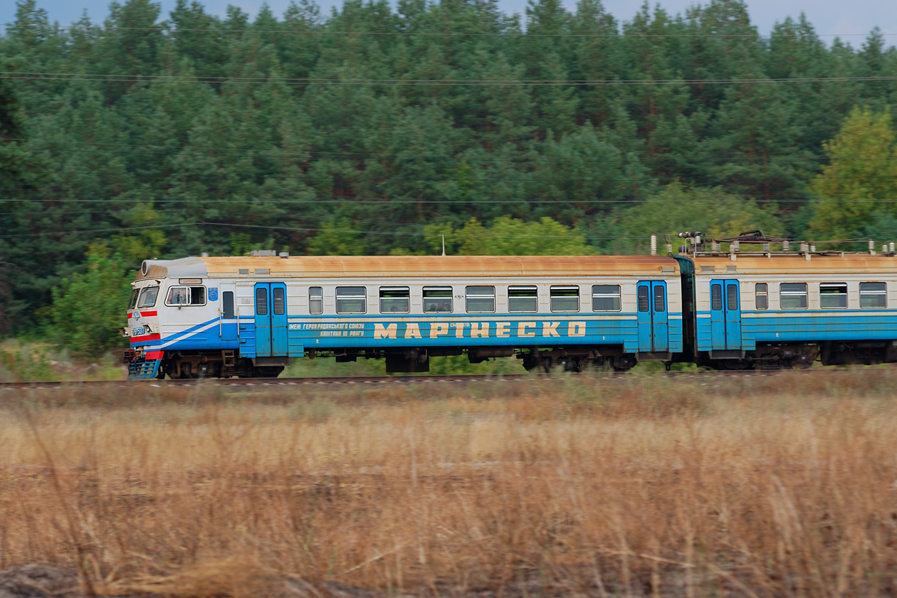 Электропоезд ЭР9М-537 «Маринеско» на перегоне Цыбулёво - Фундуклеевка, Кировоградская обл.